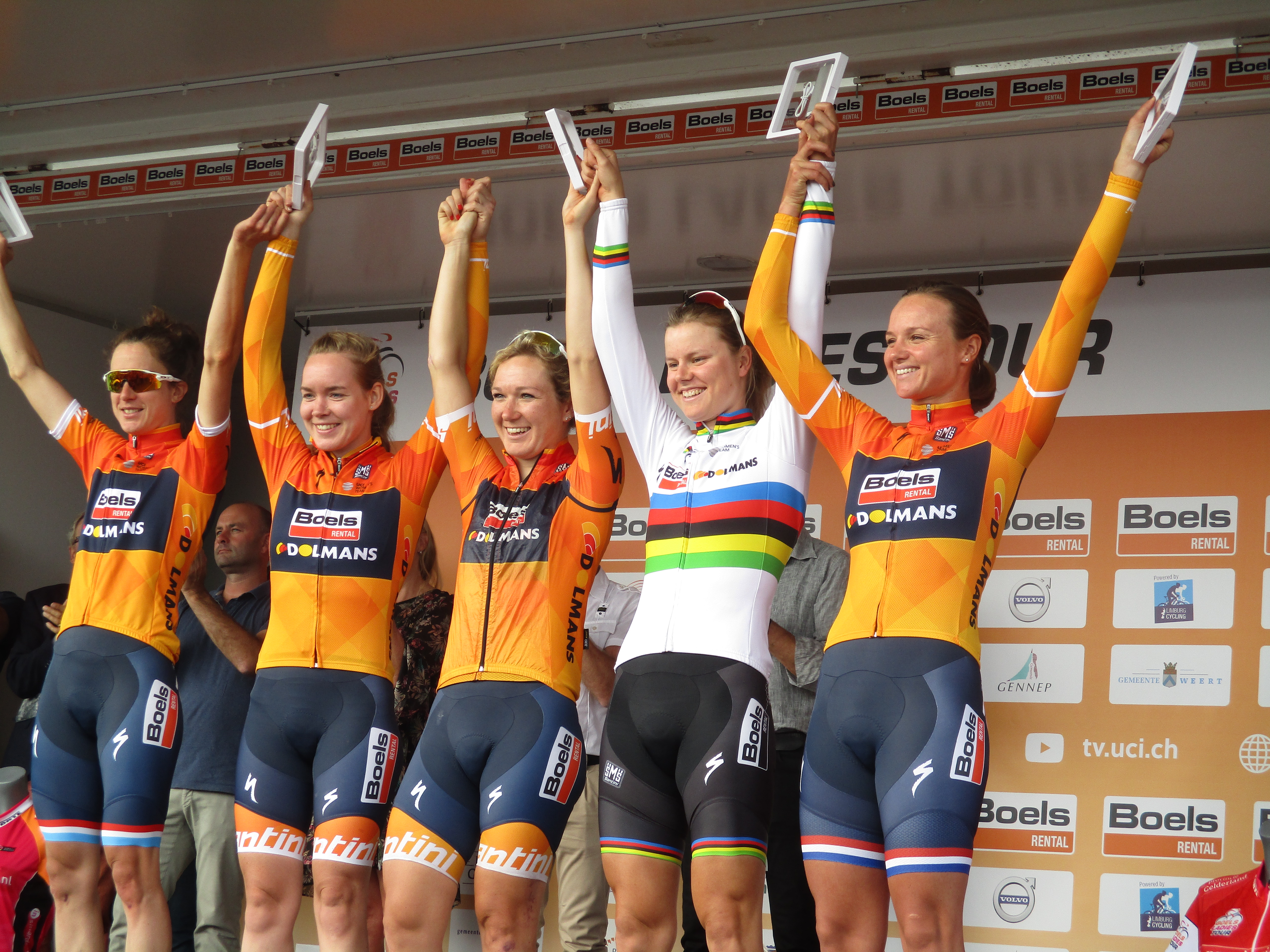 Huldiging van de winnaars van de Boels Ladies Tour 2017 op het Tom Dumoulin Bike Park in Sittard-Geleen.